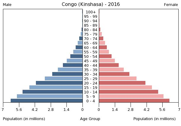 A population pyramid illustrates the age and sex structure of a country's population and may provide insights about political and social stability, as well as economic development. The population is distributed along the horizontal axis, with males shown on the left and females on the right. The male and female populations are broken down into 5-year age groups represented as horizontal bars along the vertical axis, with the youngest age groups at the bottom and the oldest at the top. The shape of the population pyramid gradually evolves over time based on fertility, mortality, and international migration trends.